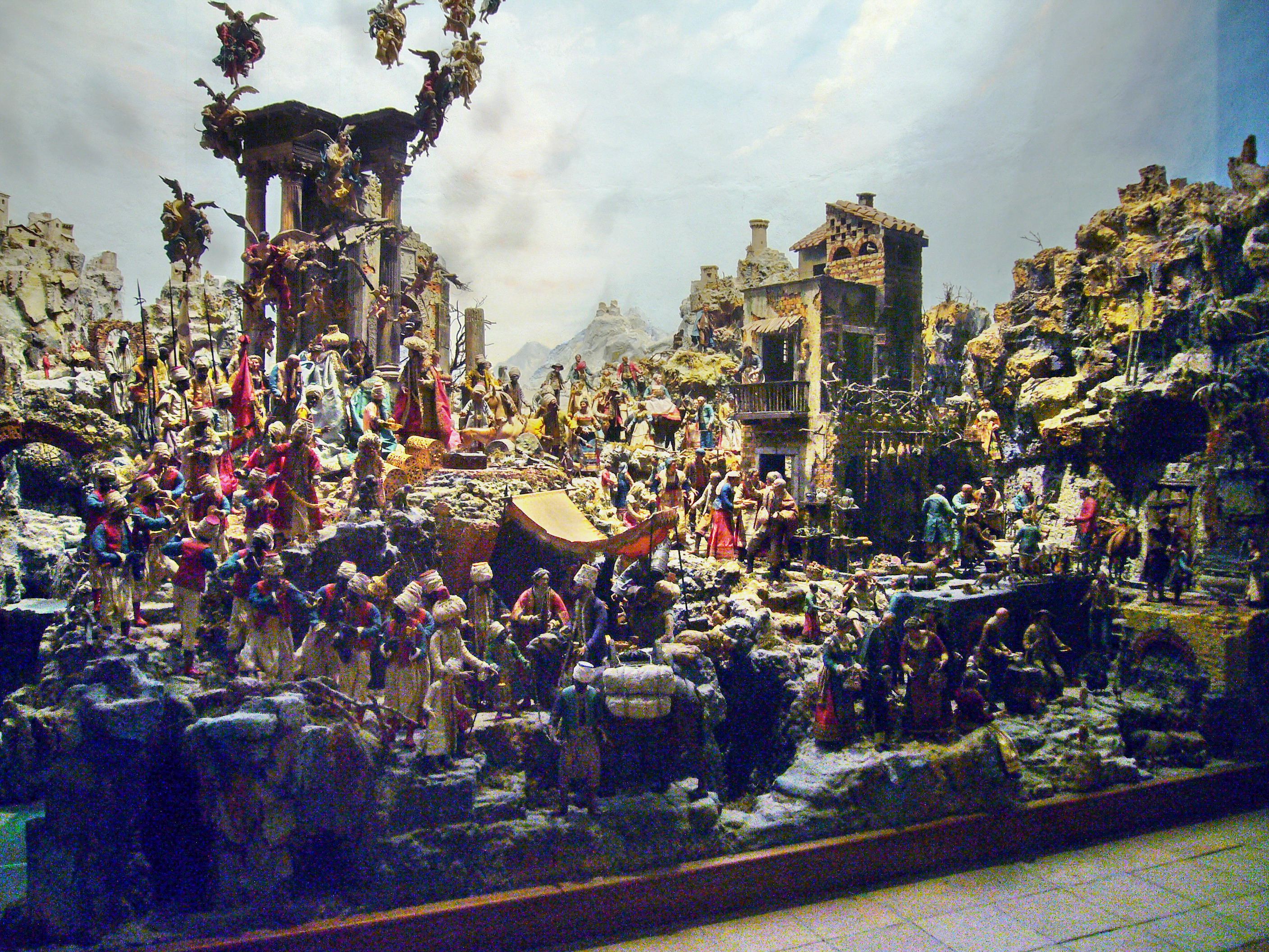 Napoli, Certosa di san Martino: il presepe Cuciniello